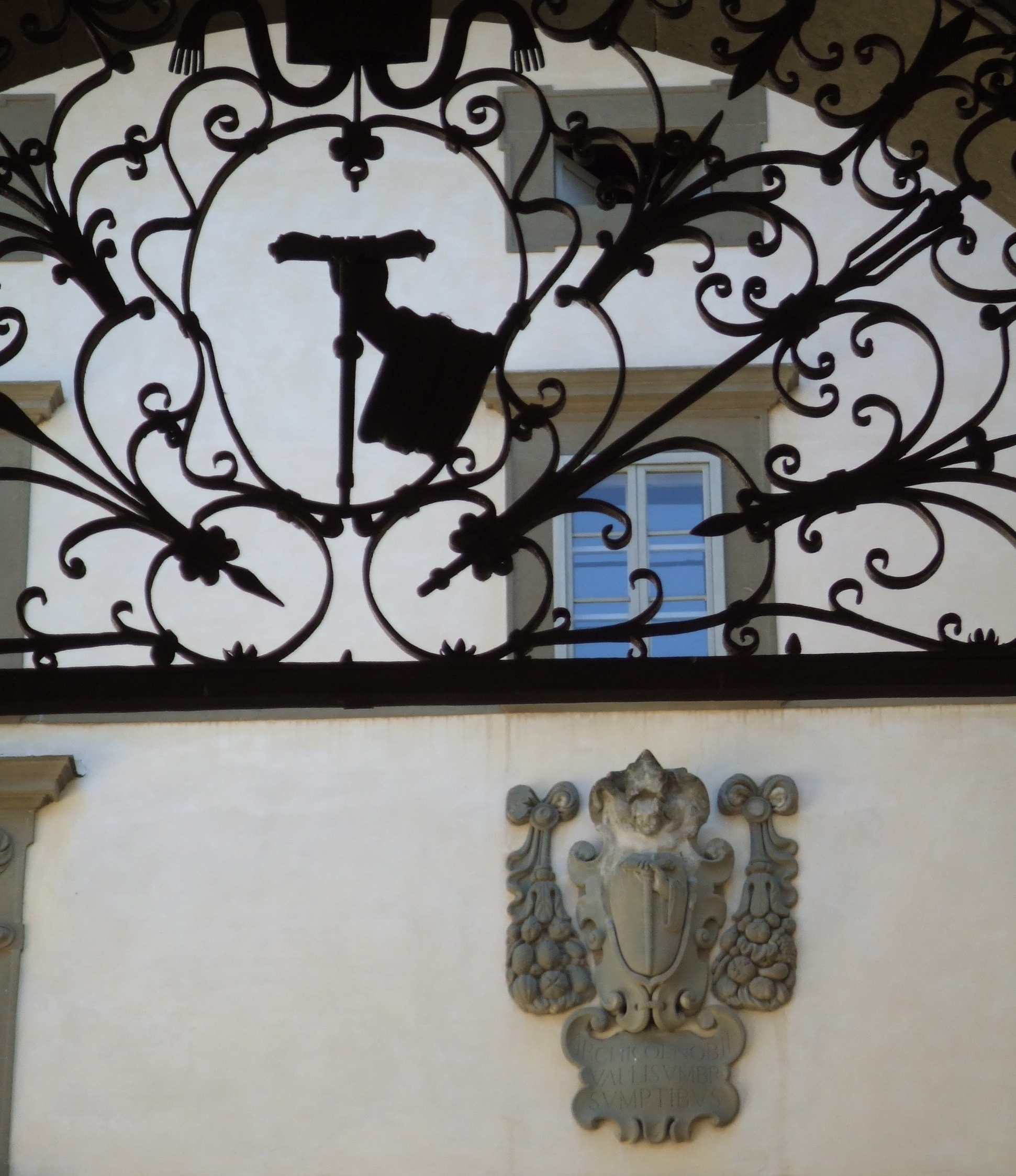 Grille et bas-relief exposant l'attribut du bâton de saint Jean Gualbert à Vallombreuse